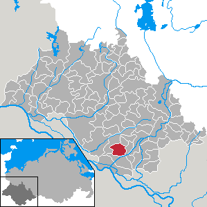 Malliß in Mecklenburg-Vorpommern - district Ludwigslust